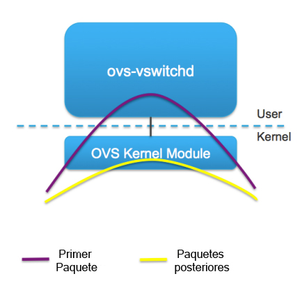 Proceso de OVS